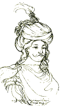 ალექსანდრე III.